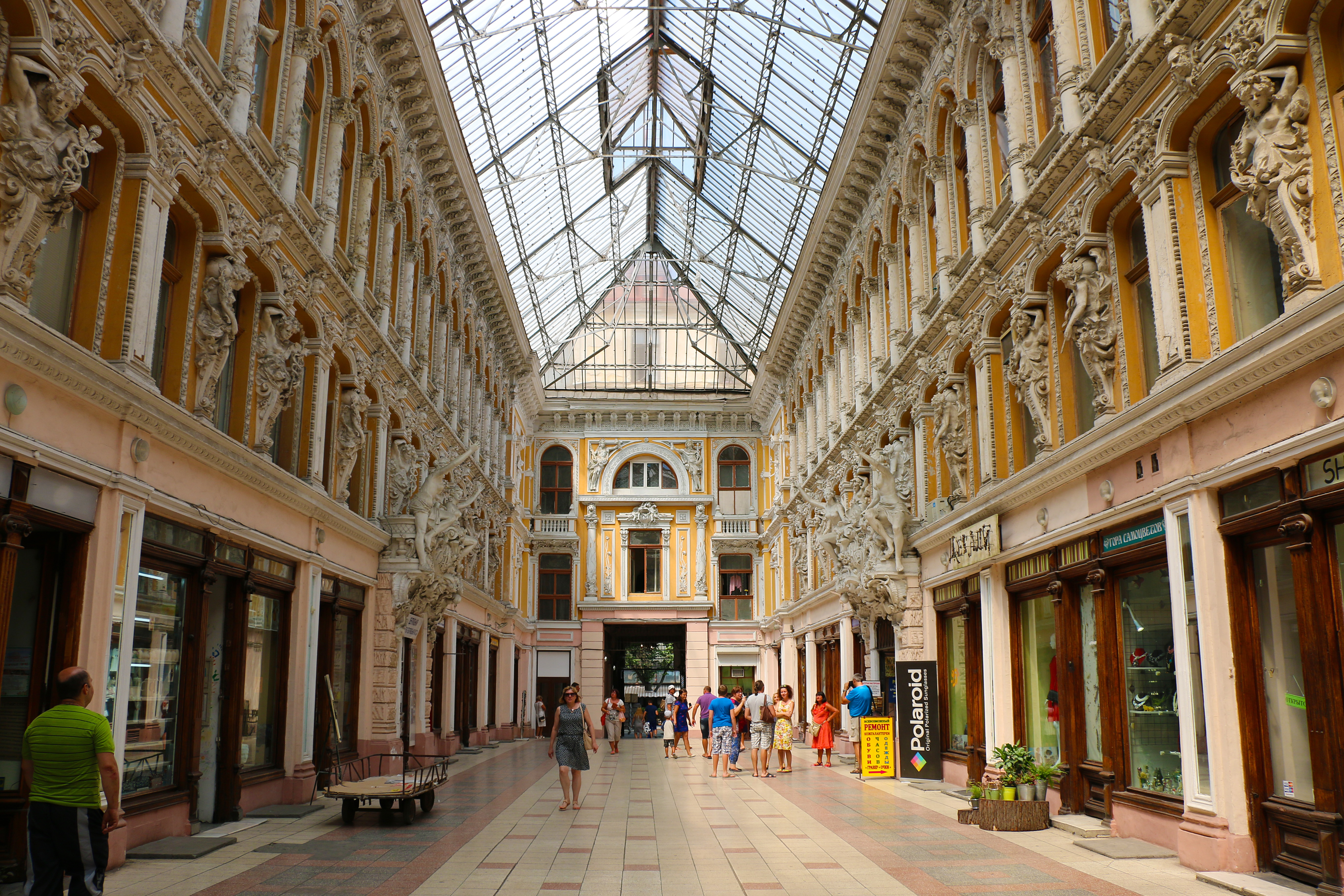 Пасаж та готель «Пасаж», де у 1921–1923 рр. містився штаб 51-ї Перекопської дивізії, якою командували В. К. Блюхер і П. Є. Дибенко, Одеса, Преображенська вул., 34/33 (ріг вулиць Преображенської, 34 та Дерибасівської, 33)